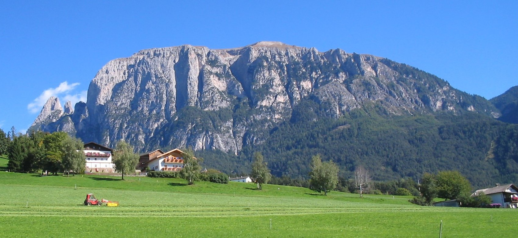 Der Schlern in Südtirol